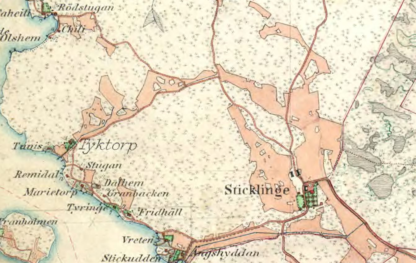 Sticklinge gård på Häradsekonomiska kartan